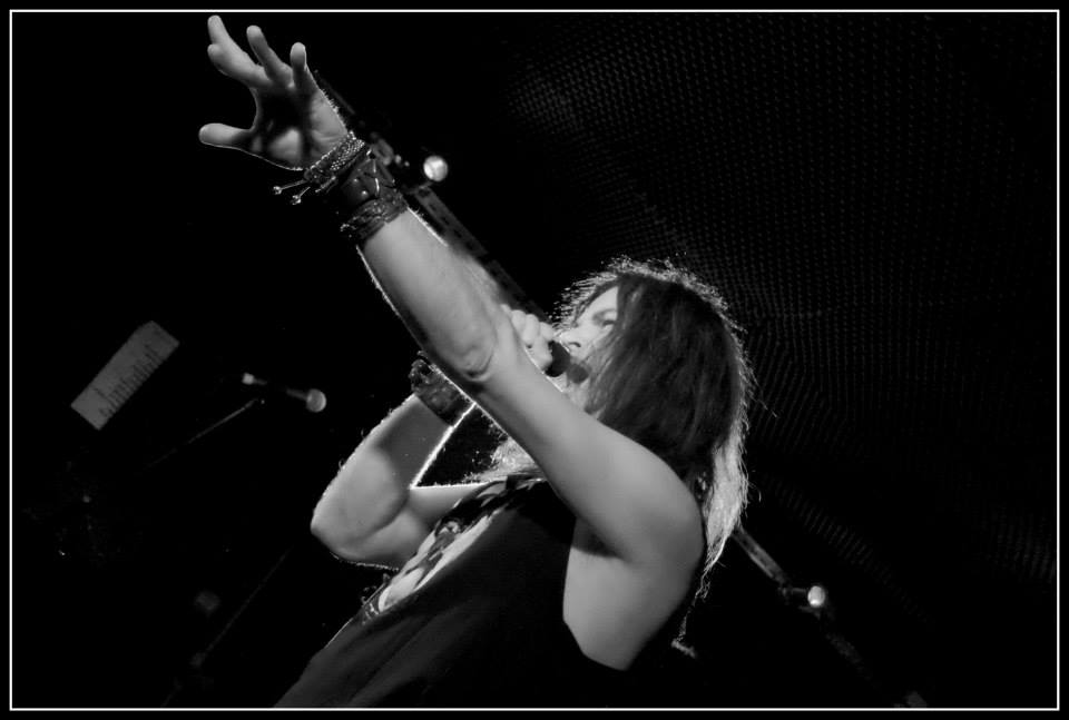 Butcho Vuković sur scène en 2018.